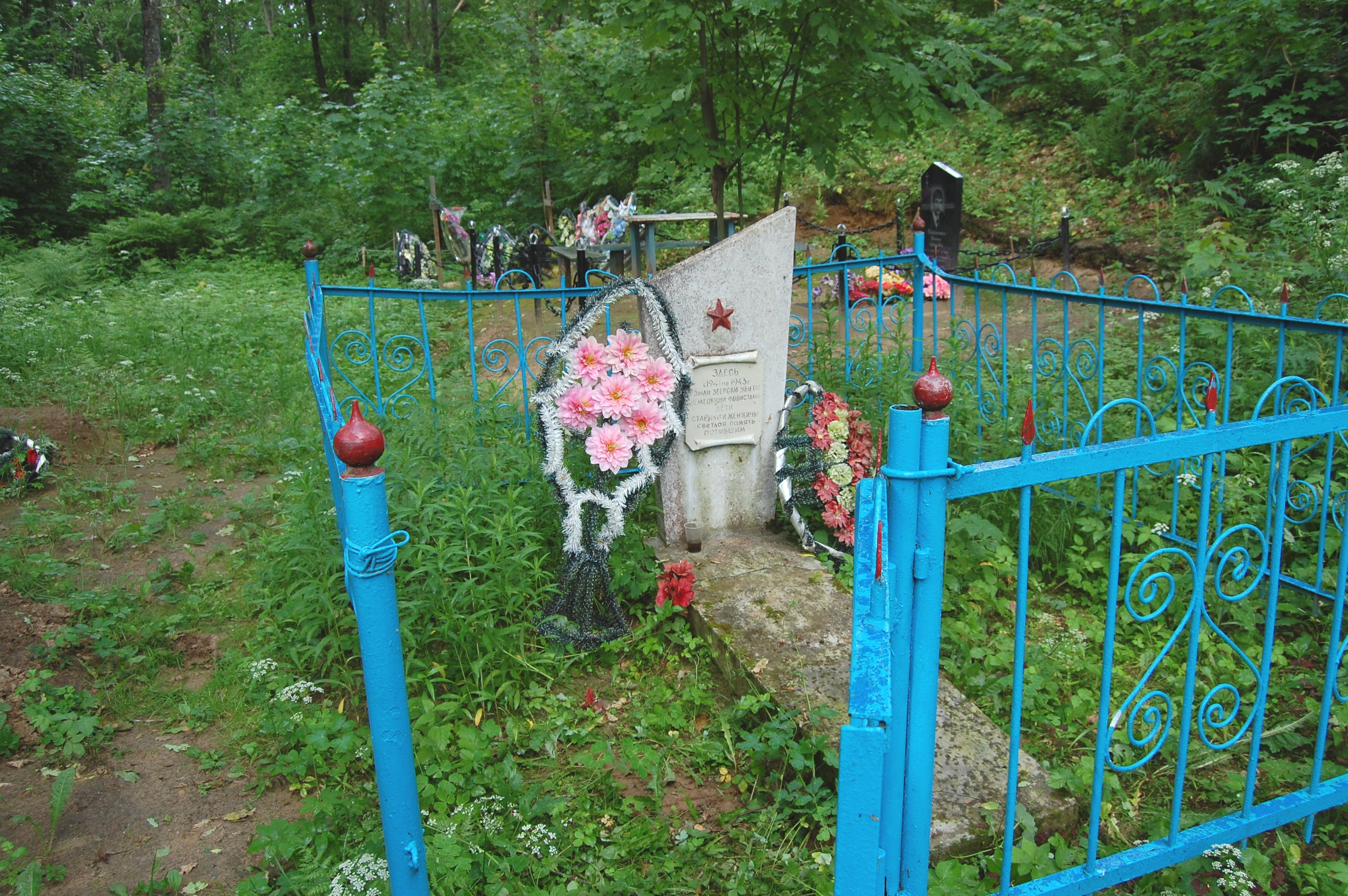 Старый (первоначальный) памятник евреям - узникам гетто в деревне Вороничи Полоцкого района, убитым во время Холокоста. Заменен на новый в 2017 году.